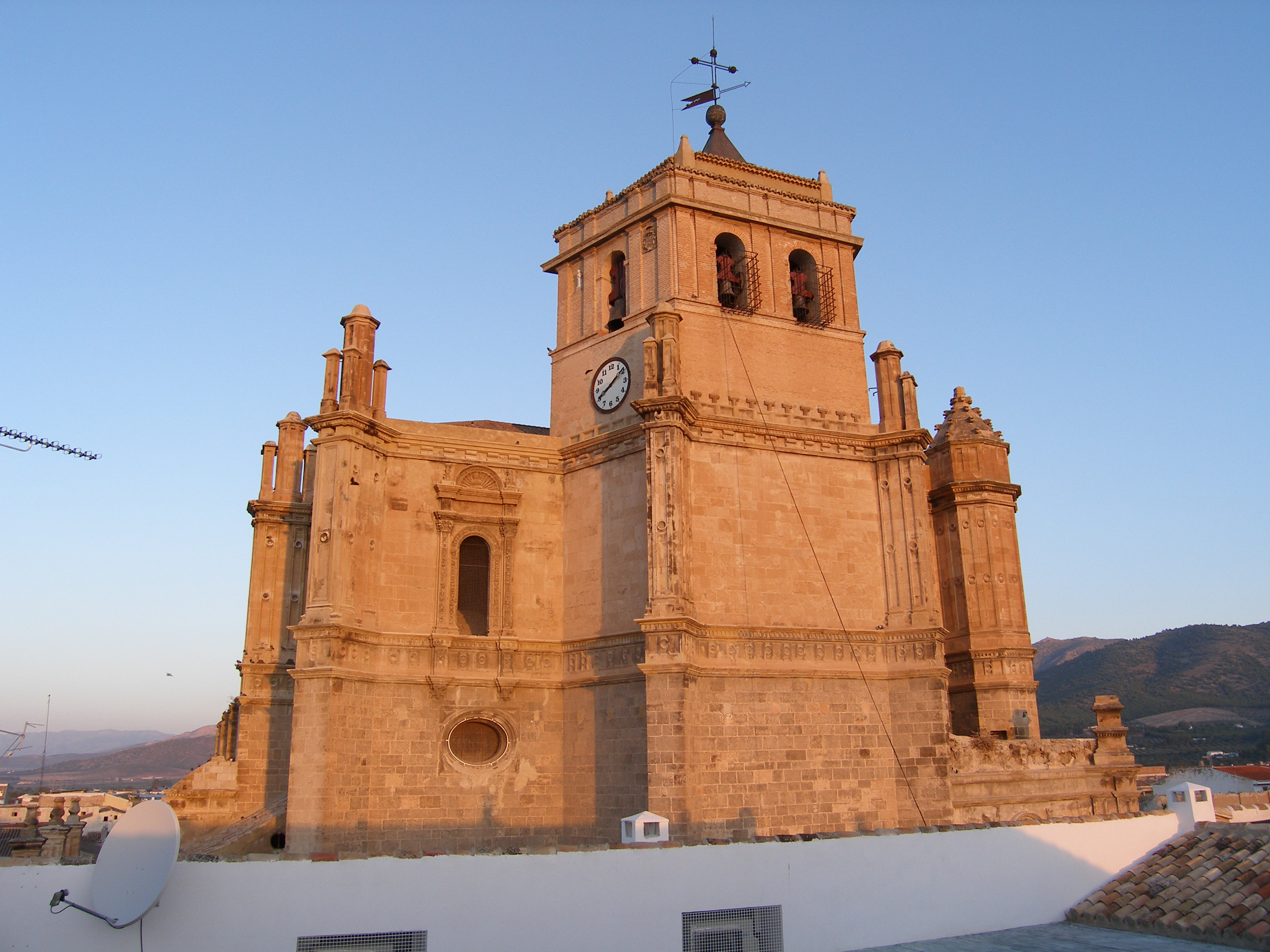 Colegiata de la Encarnación(Parroquia de Santa María la Mayor)